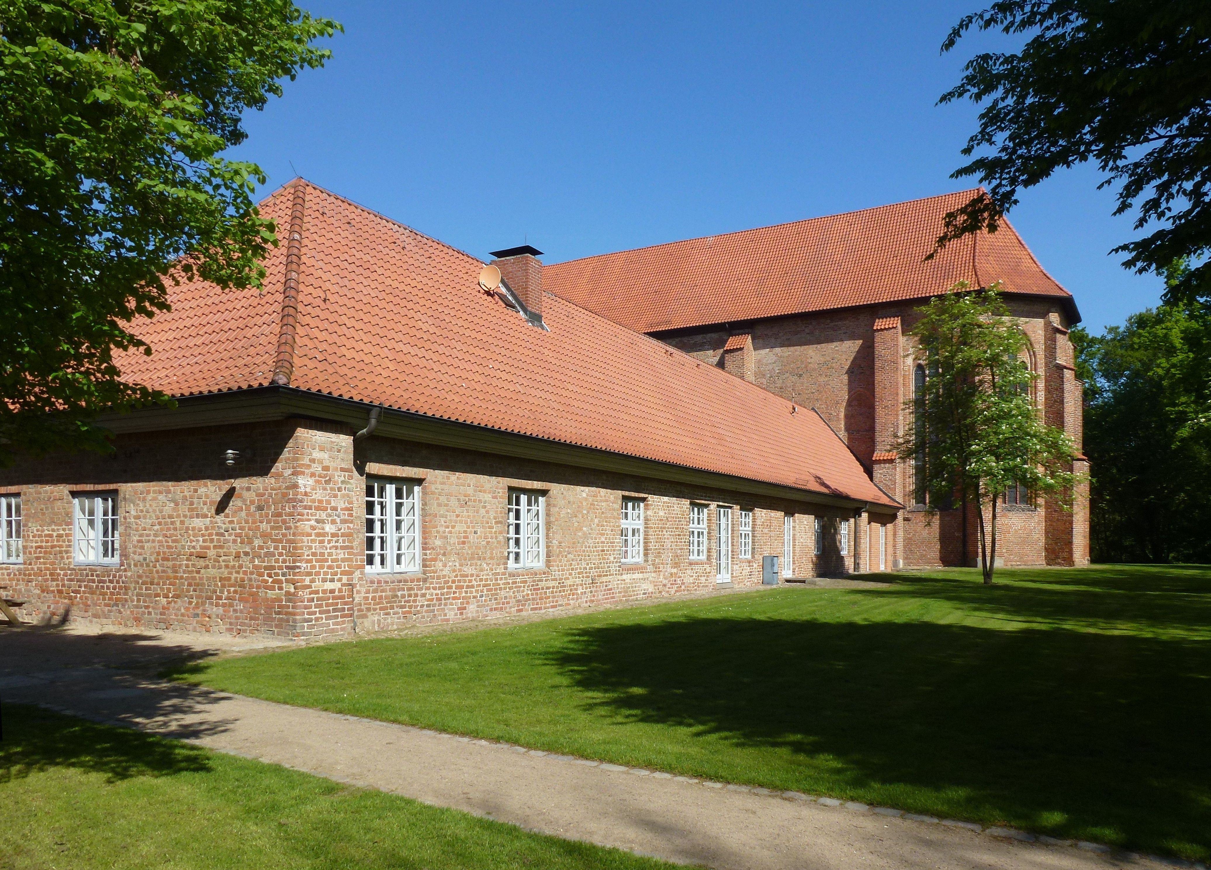 Kloster Cismar